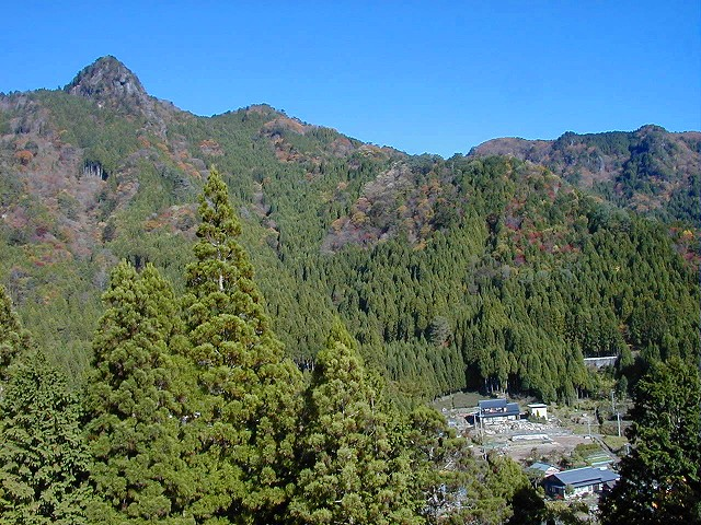 山麓から見た平山明神山